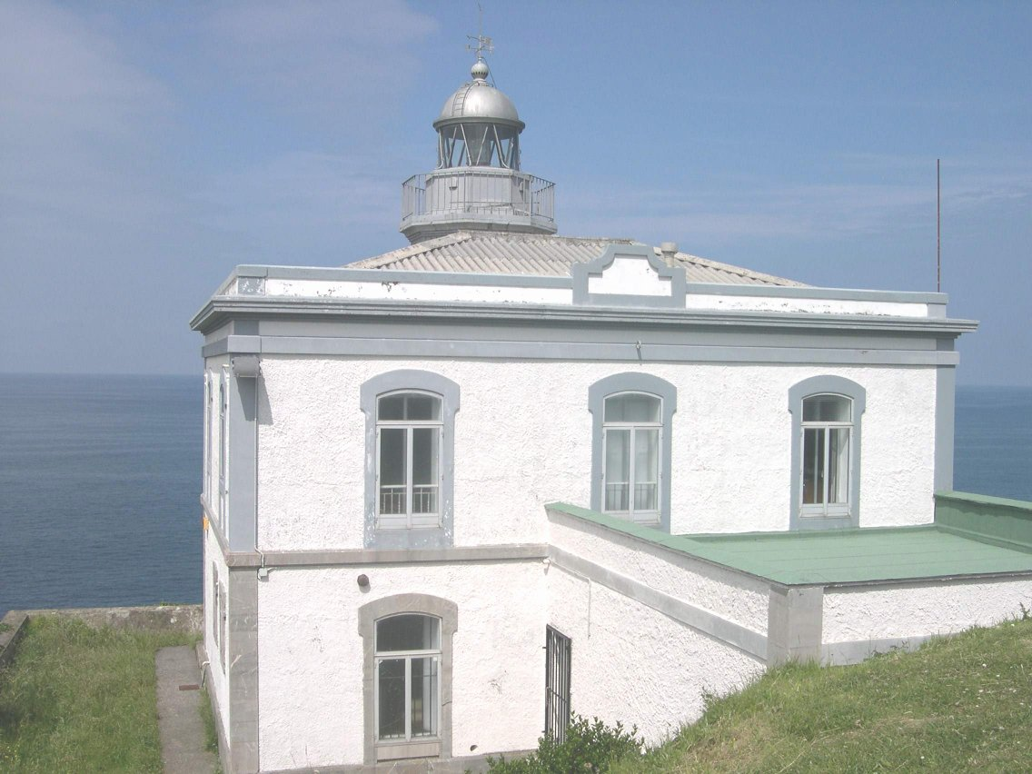 Faru de candas